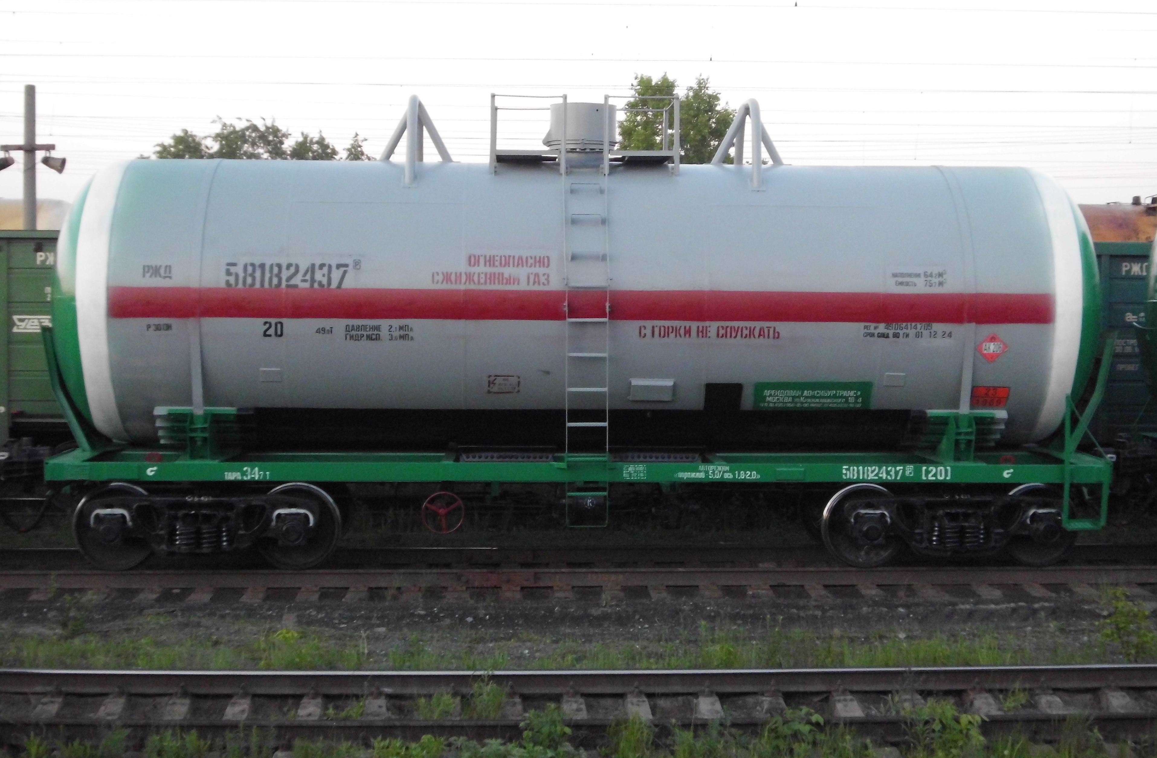 4-х осный вагон-цистерна с бронелистом для сжиженных углеводородных газов. Россия.